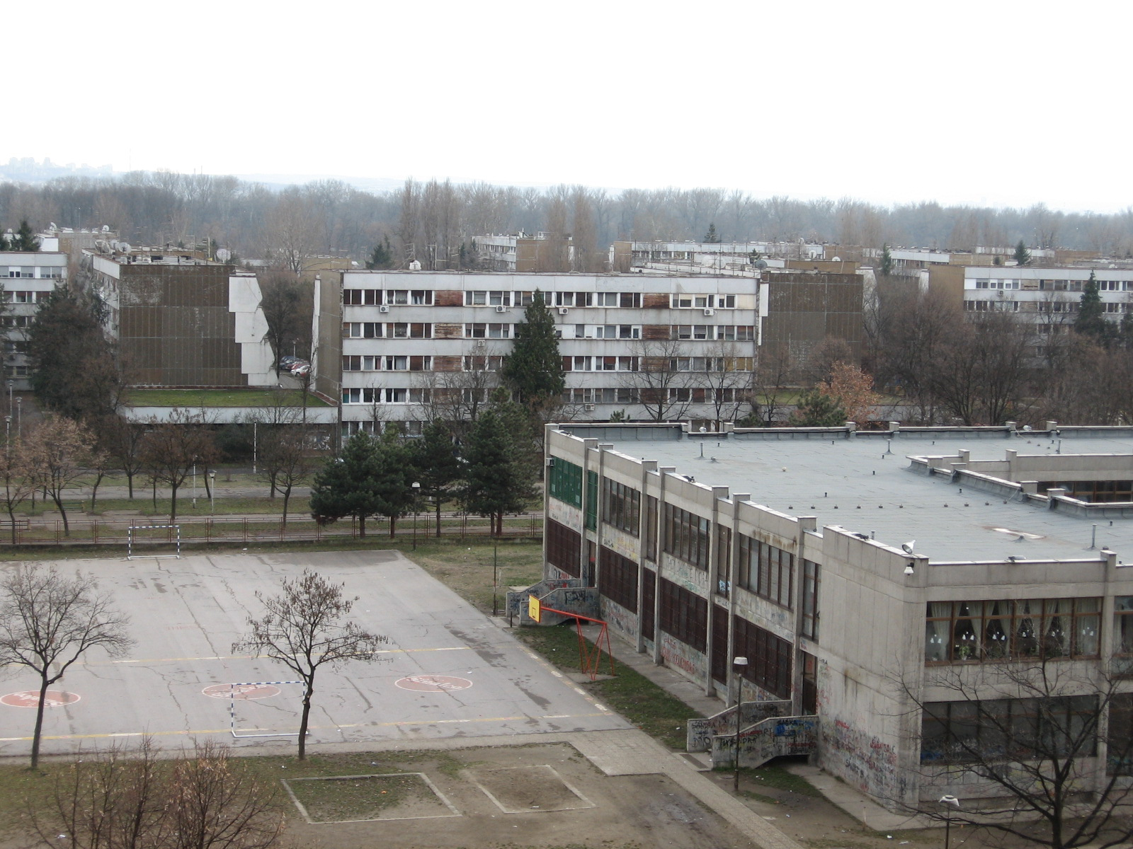 Photographie du Blok 45 dans le quartier de Savski Blokovi, municipalité de Novi Beograd, ville de Belgrade